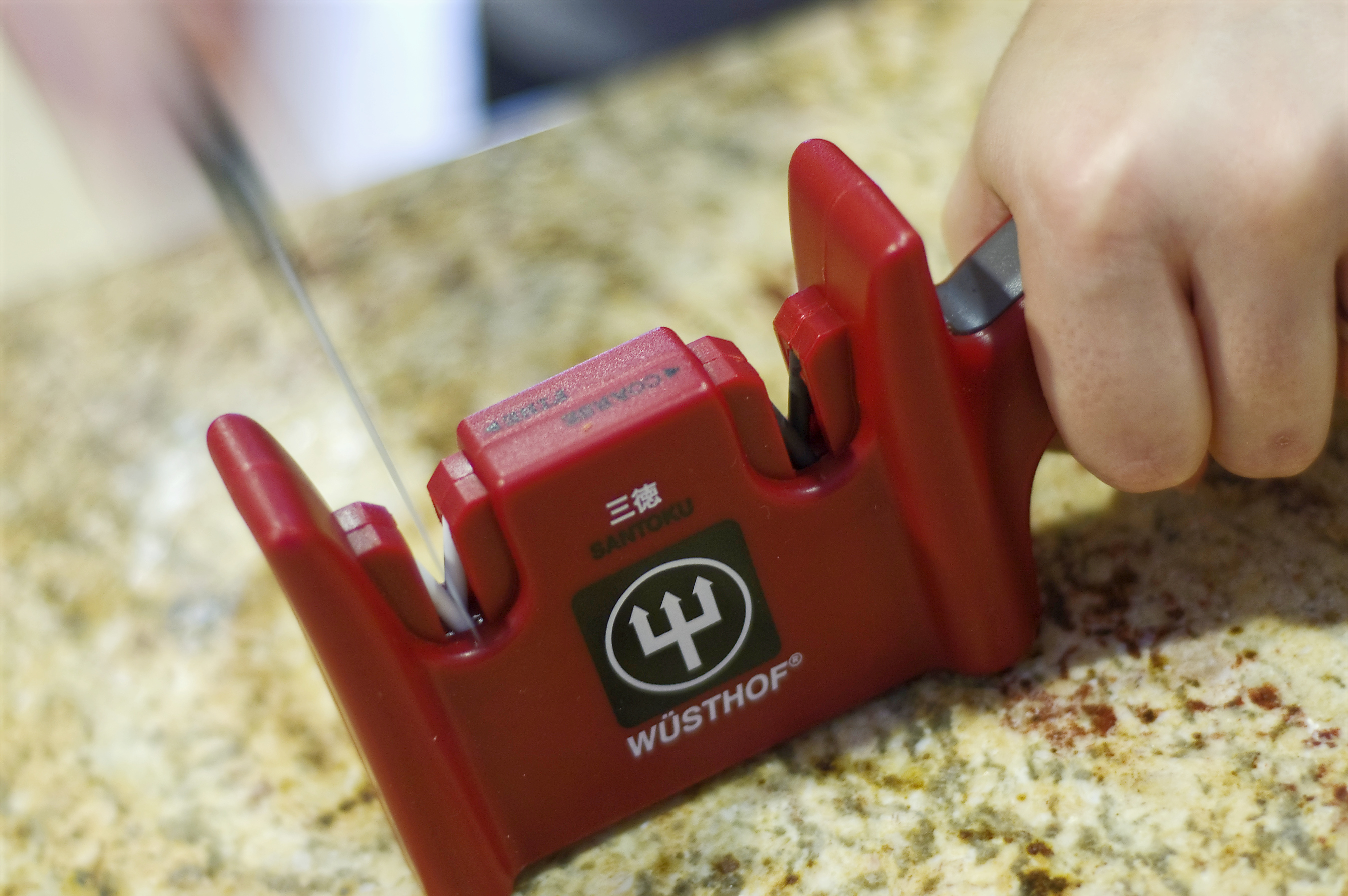 Dualer manueller Messerschärfer, Fabrikat Wüsthof, aus Solingen, Deutschland. Mit zwei Schleifstufen: "grob/coarse" mit Schleifkörper aus Diamant, "fein/fine" mit Schleifkörper aus Keramik. Für Küchen- und Kochmesser (für Wellenschliffmesser nicht geeignet).